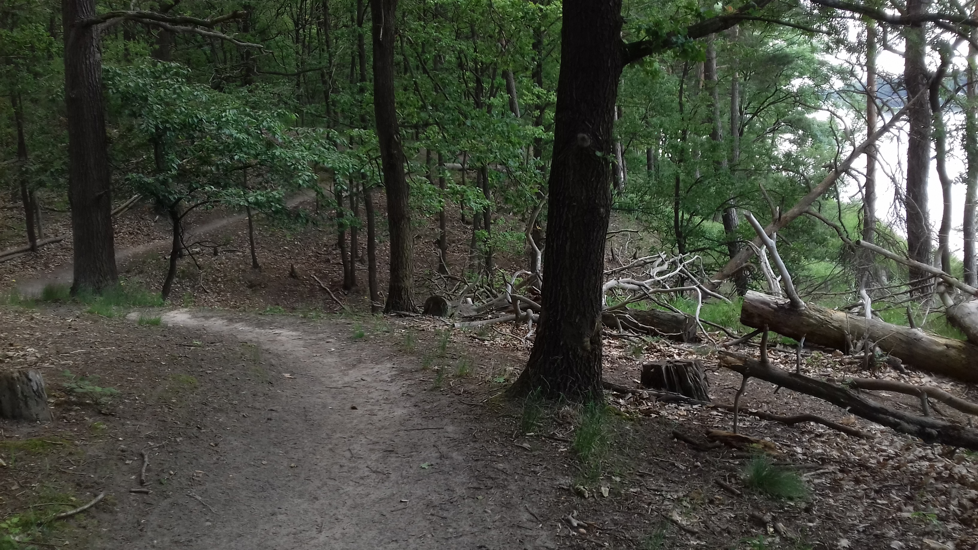 Szlak pieszy nr 3590 (czarny) nad brzegiem Jeziora Dymaczewskiego.